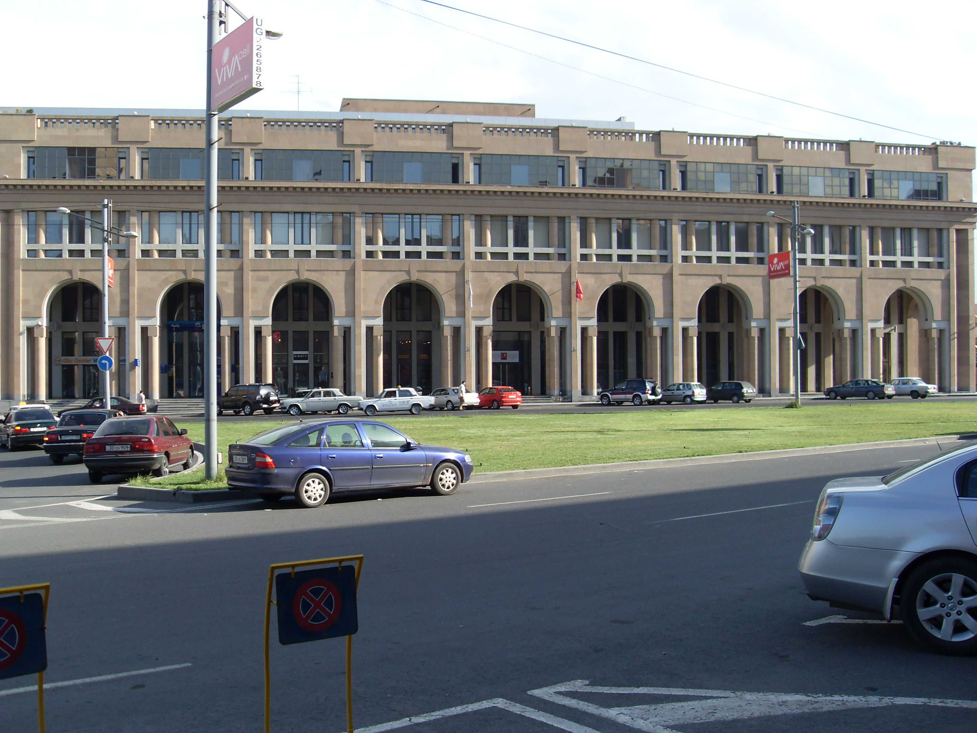 Մոսկվայի տուն, Երևան